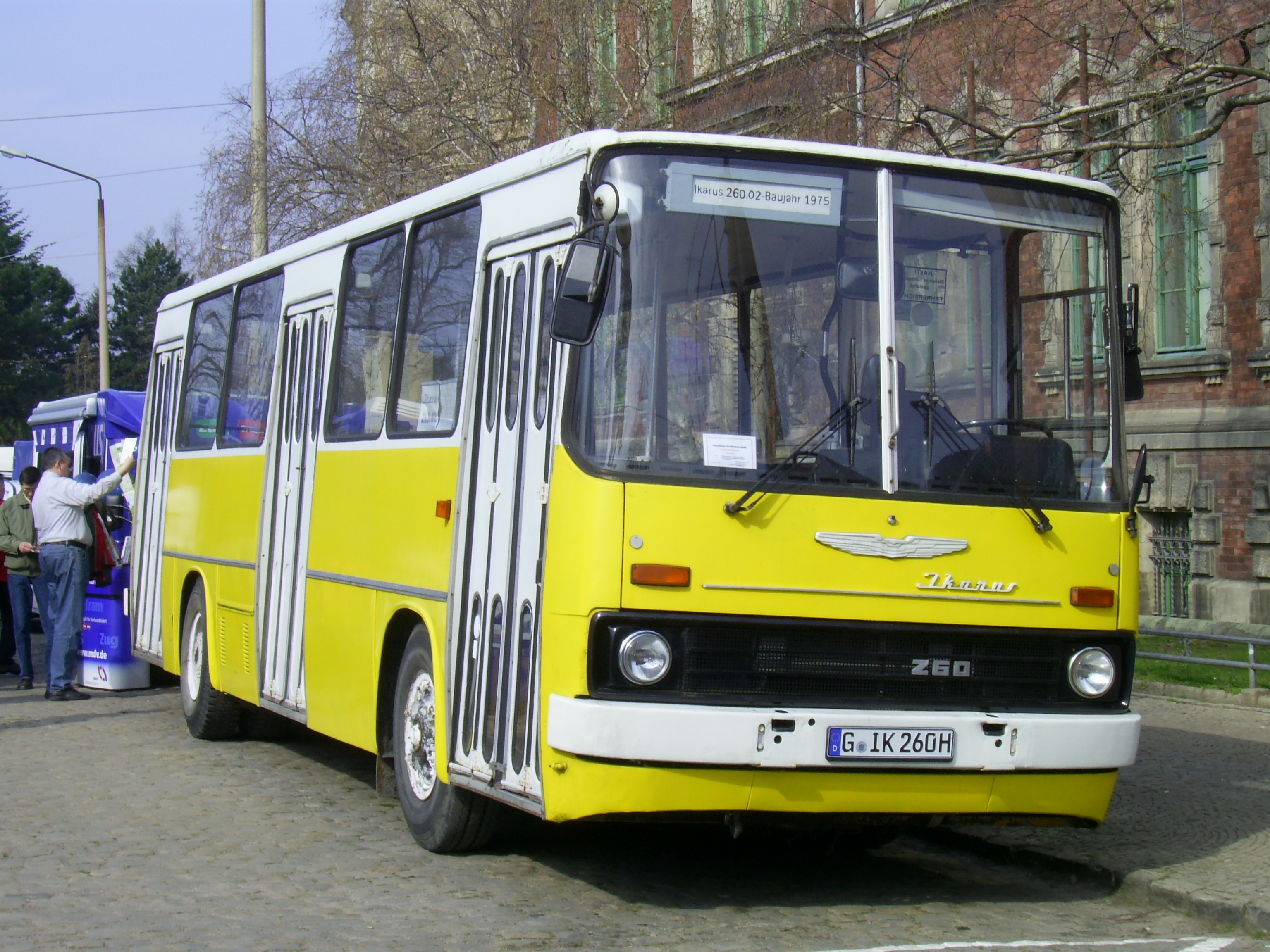 Ikarus 260.02 aus Gera zu Gast in Naumburg bei der Naumburger Straßenbahn während der Festlichkeiten 2007